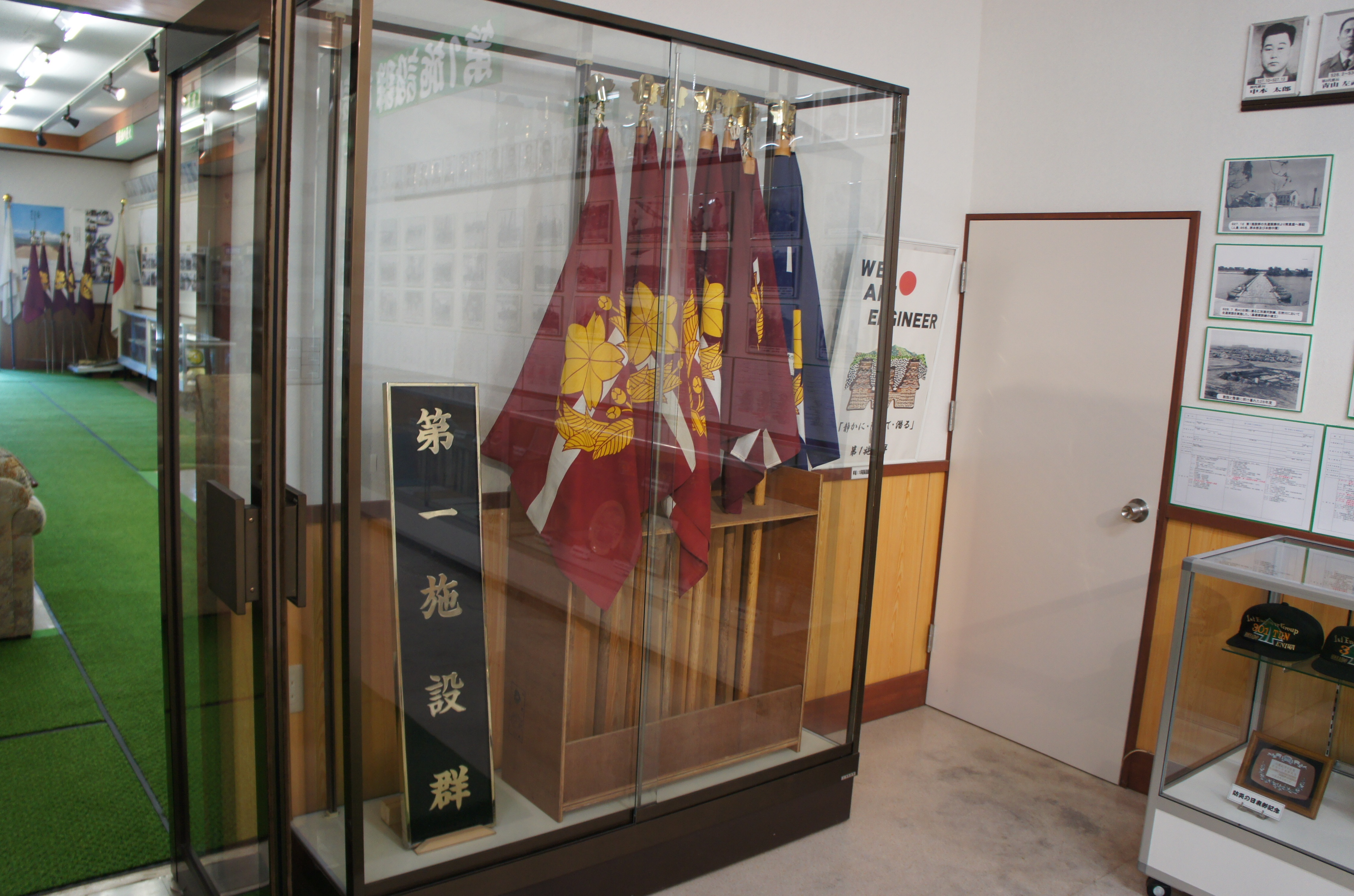 第1施設群門標と隊旗、最右翼には同部隊を支援していた施設直接支援大隊第1直接支援中隊の隊旗も展示されている